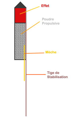 Schema d'une fusée de feu d'artifice